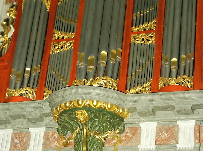 Eigen opname detail orgel Jacobikerk Utrecht (2004)